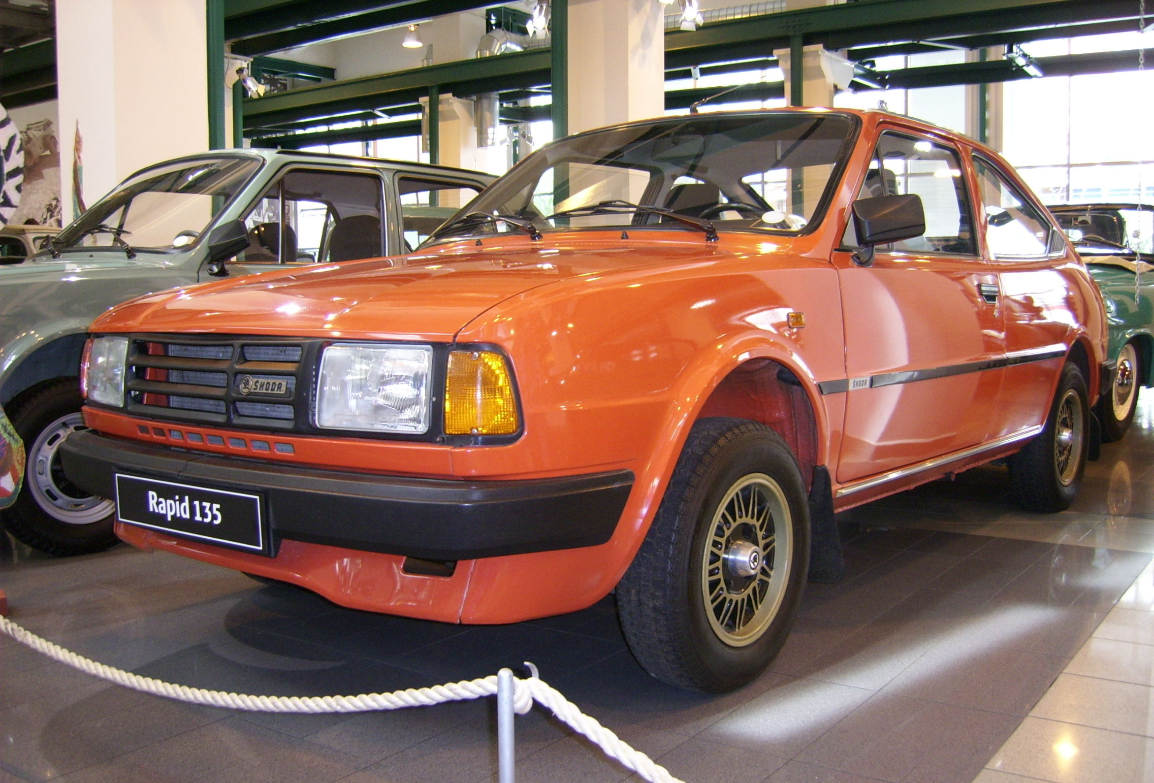 Skoda Rapid im Museum